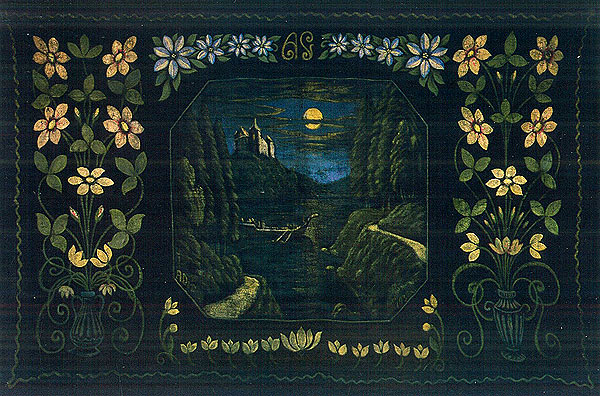 1937 г. Матэр'ял і тэхніка палатно, тэмпера Памеры 130 х 194 Месцазнаходжанне Гісторыка-культурны музей-запаведнік "Заслаўе"